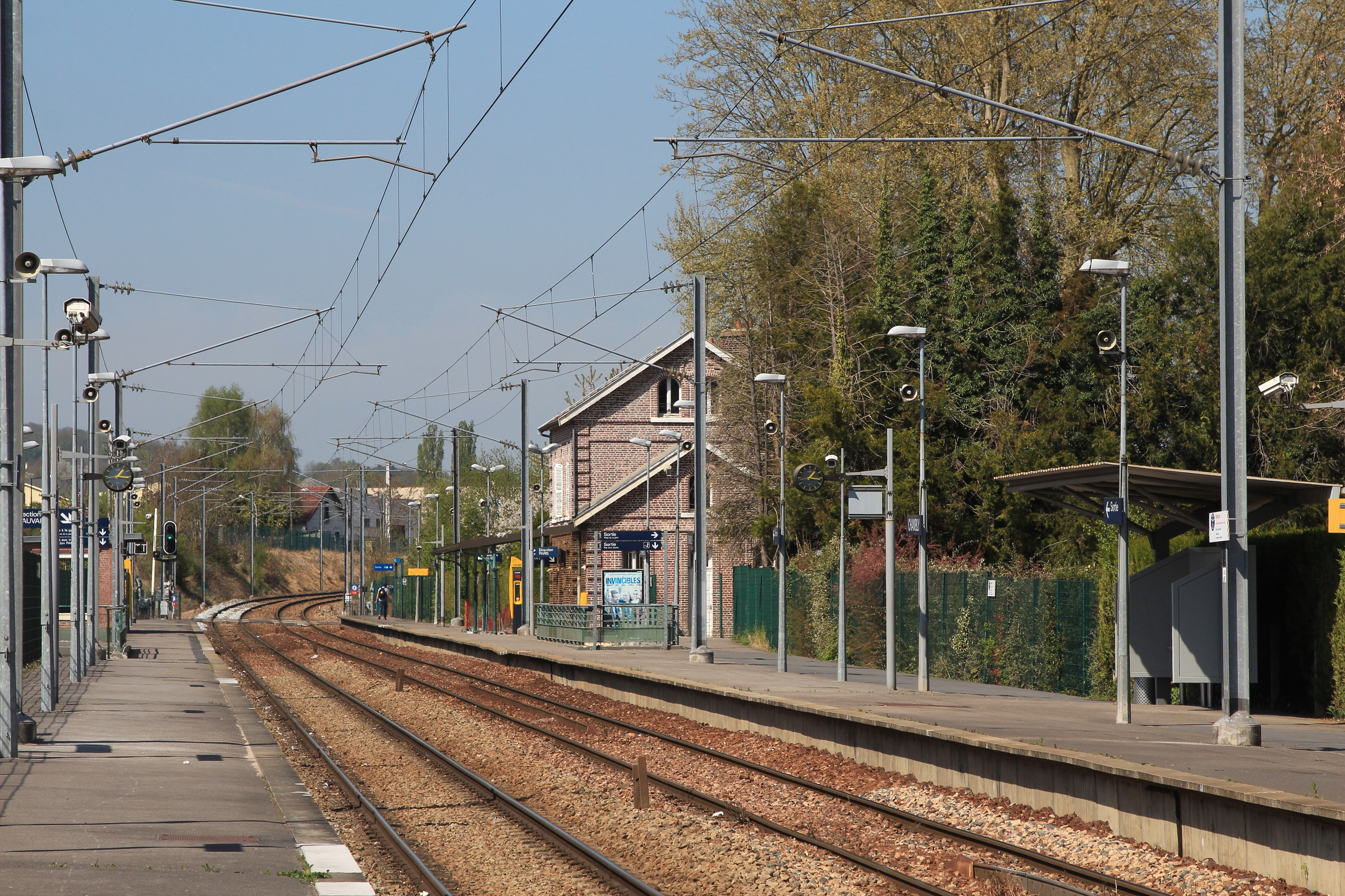 Vue générale des quais en direction de Beauvais, en gare de chambly.